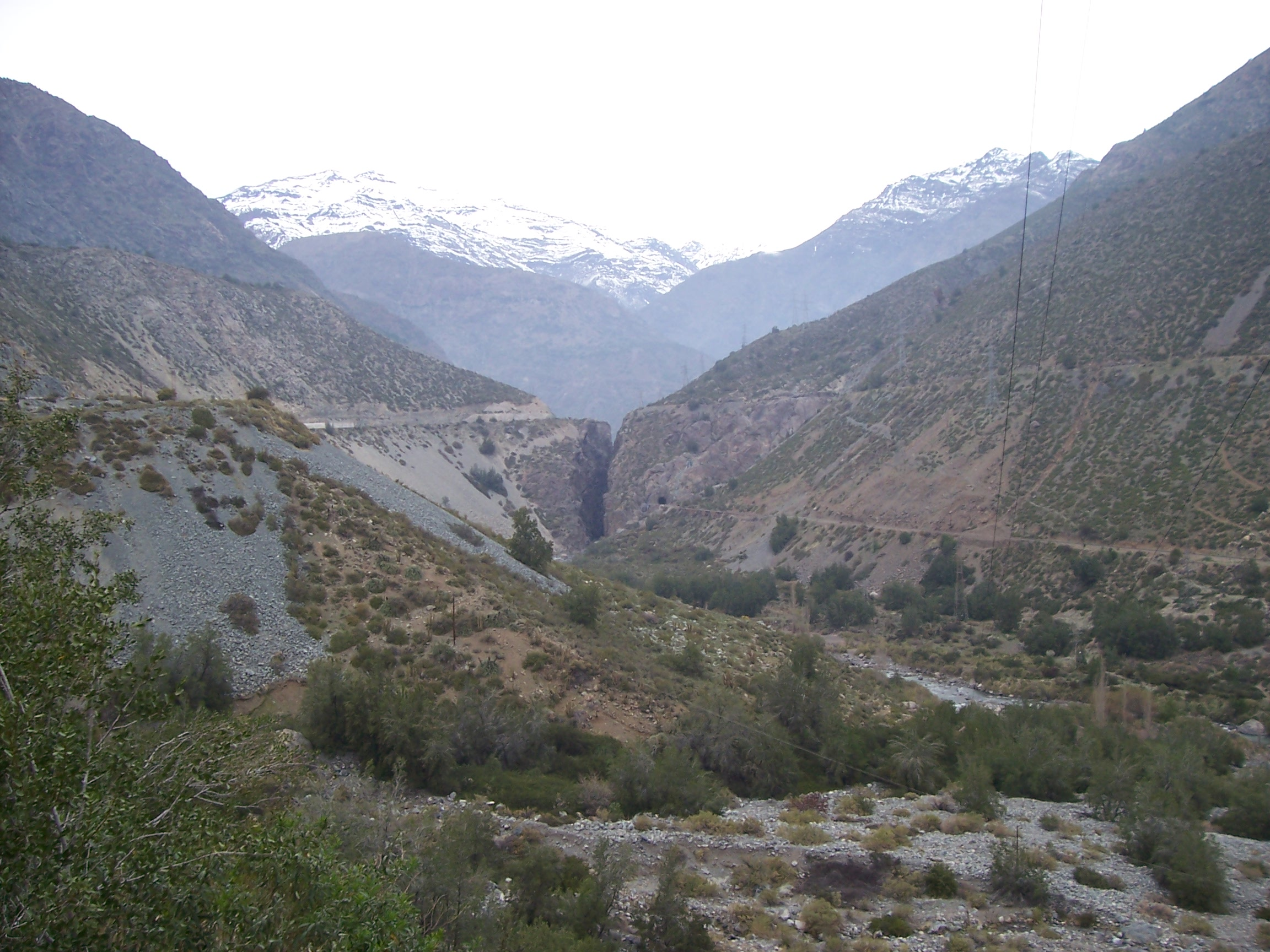 Imagen desde el camino internacional